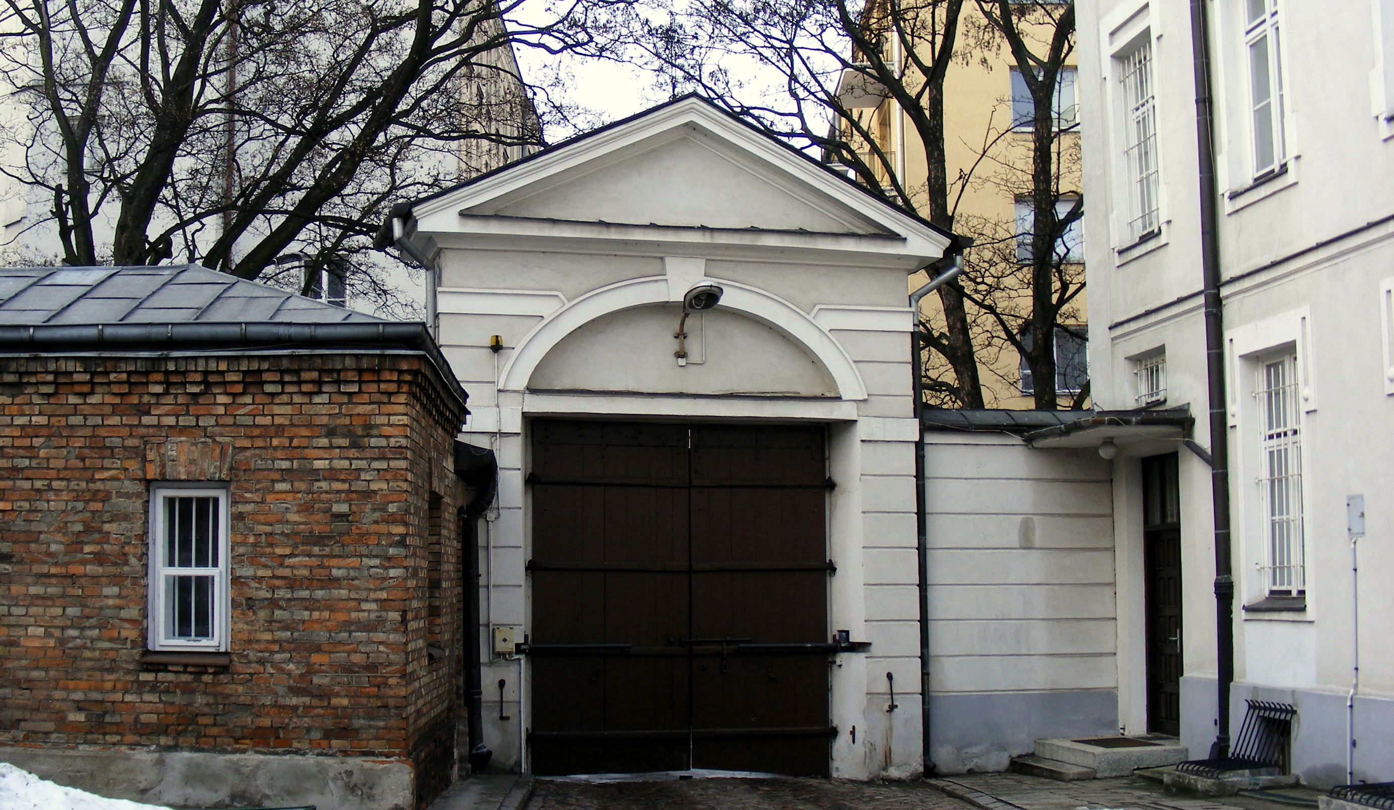 Brama wejściowa na teren zakonu sióstr Szarytek w Warszawie (widziana od wewnątrz.)